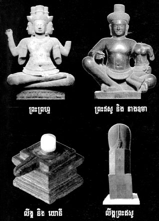 ភាសាខ្មែរ: ចំលាក់ទេវរាជ៖ព្រះព្រហ្ម ព្រះឥសូរ ព្រះនាងឧមា លិង្គព្រះឥសូរ យោនីព្រះនាងឧមា